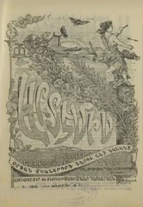 Couverture de la revue féminine Artémis, fondée par Marie Beylerian et parue entre janvier 1902 et décembre 1903 à Alexandrie (Égypte).